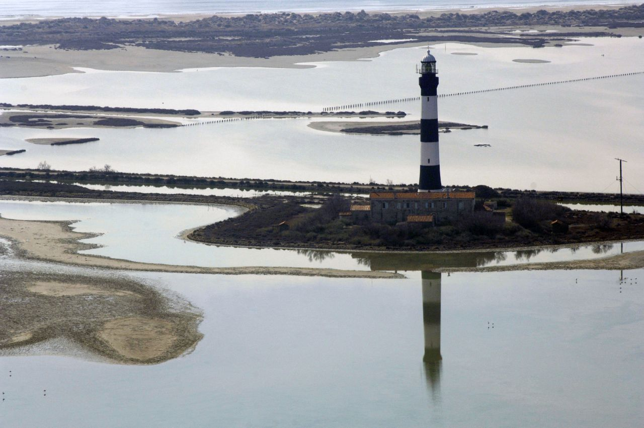 Phare de Faraman en Camargue (Région PACA)